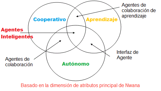 Categorización de Agentes de software por Nwana